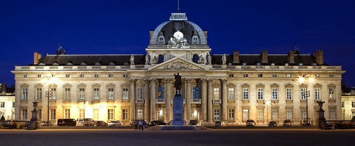 image de l'ecole